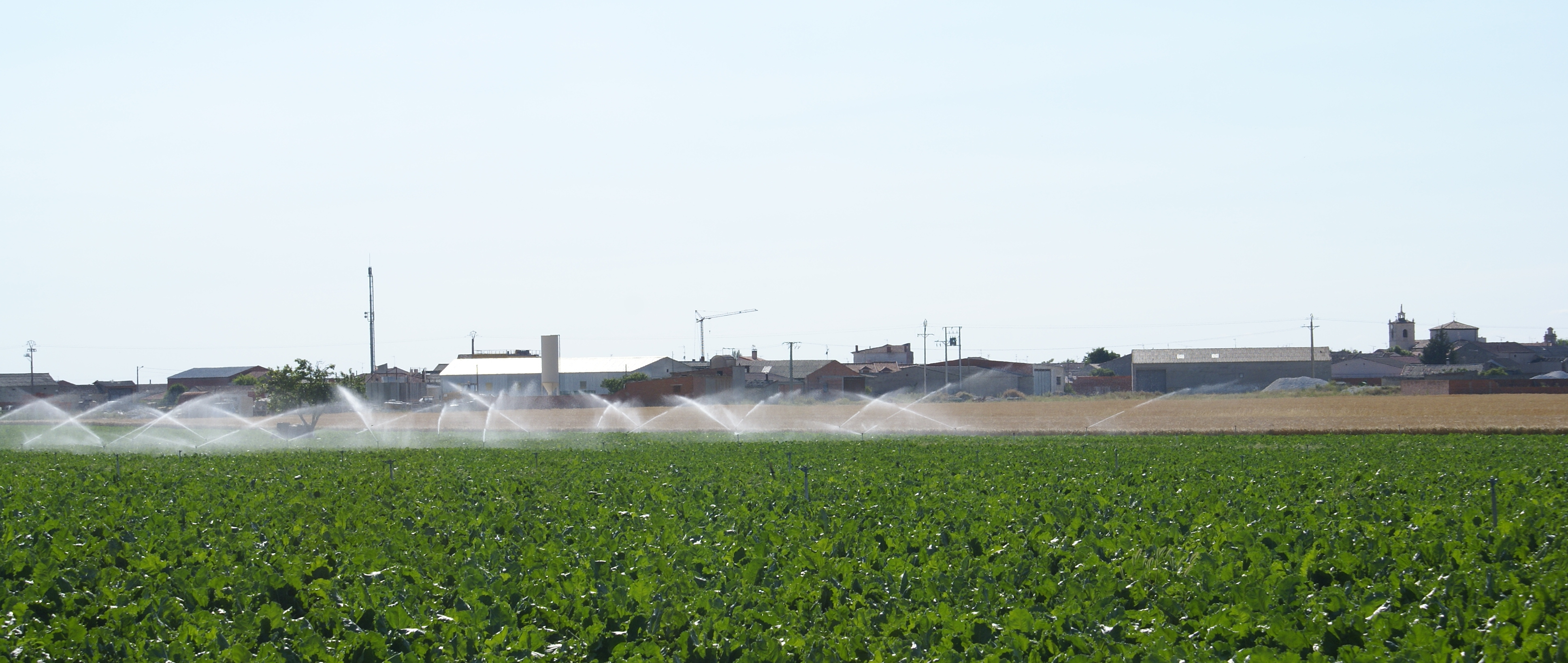 Campaspero desde sus campos